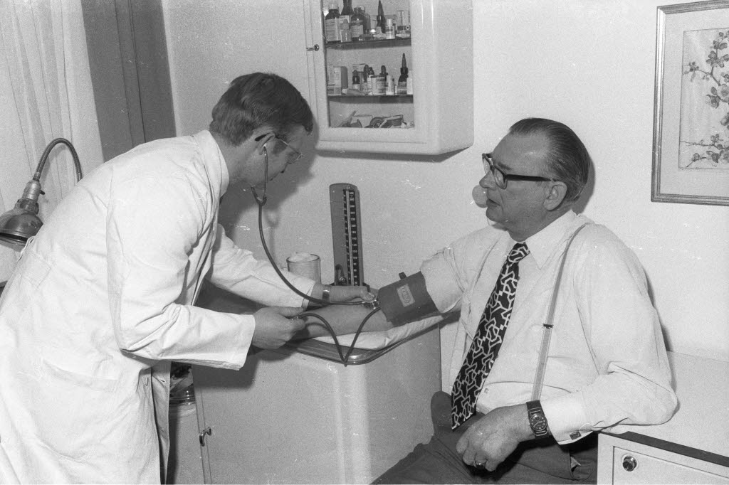 Illustration einer Serie der Kieler Nachrichten (KN) zur "Suche nach dem Landarzt von morgen".